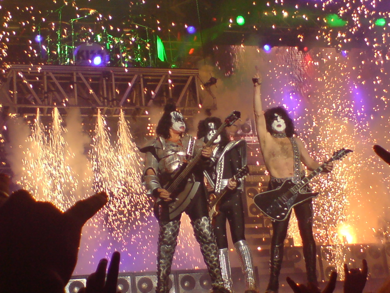 Det här är en bild av Gene Simmons och paul Stanley från bandet KISS. Bilden tog jag själv under deras spelning i Stockholm.